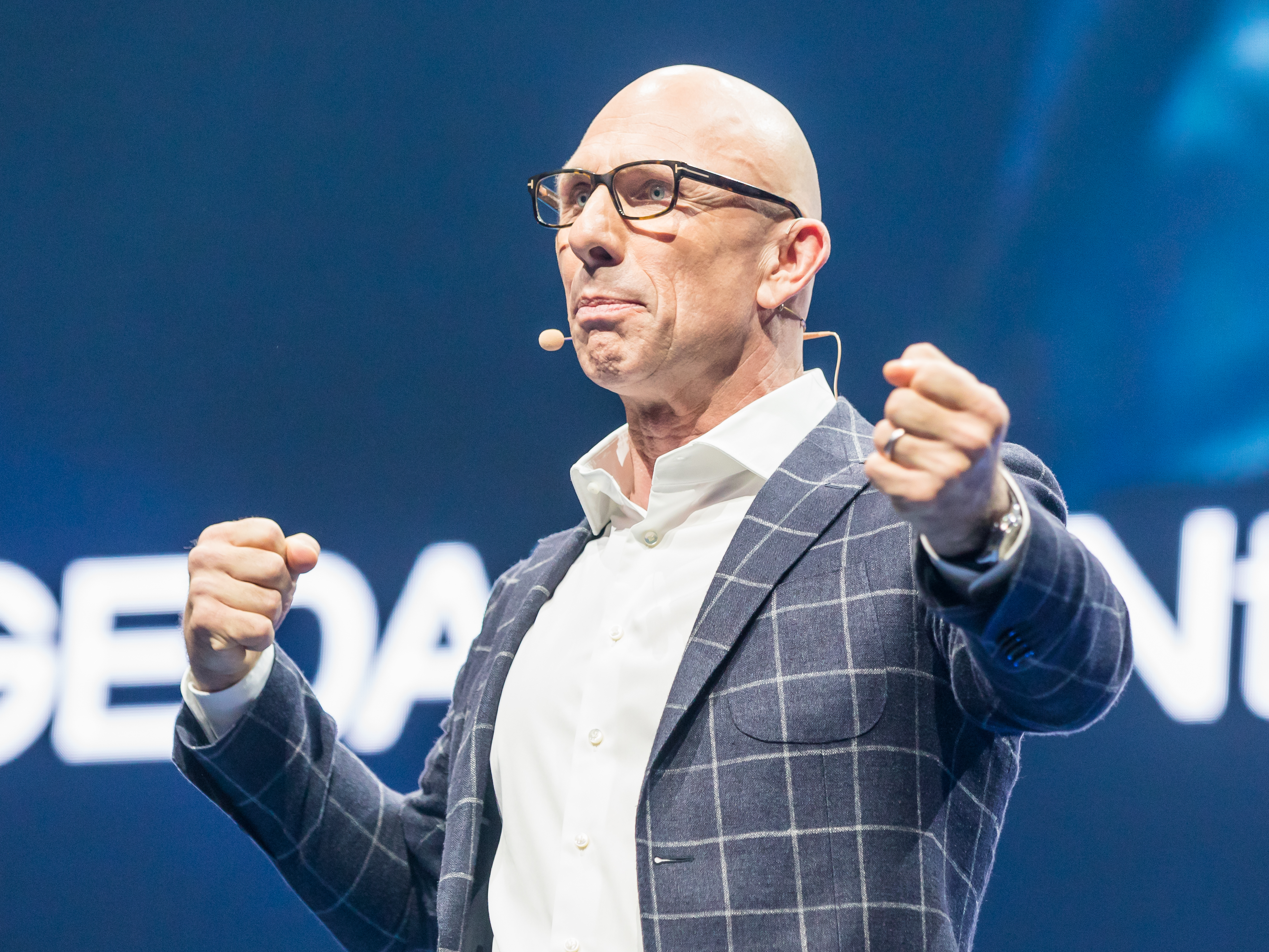 GedankenTanken Köln 2018 - 07 - Redner Jörg Löhr